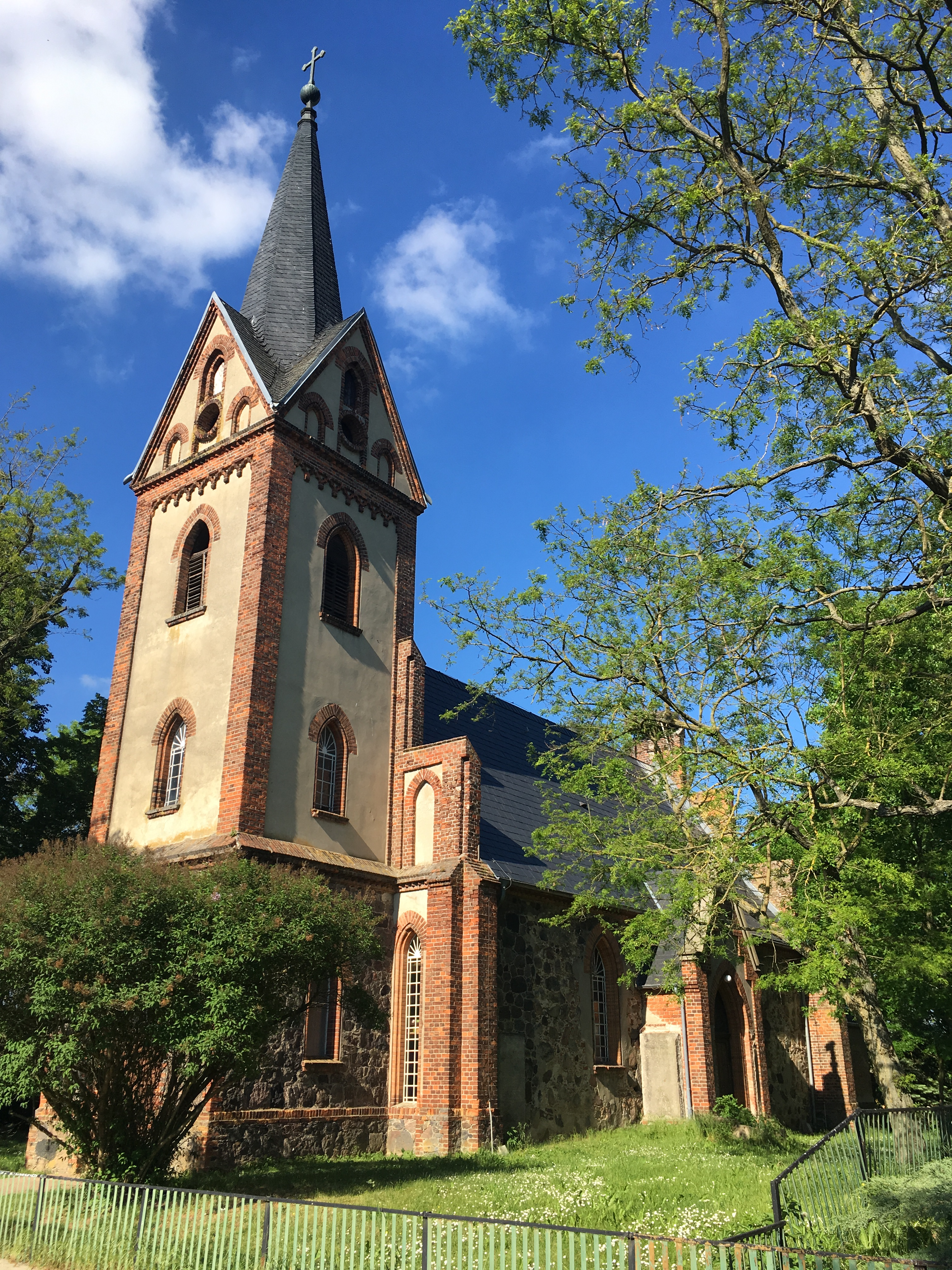 Die neugotische Saalkirche in Wilmersdorf entstand in den Jahren 1880 bis 1883 unter Verwendung von Material eines Vorgängerbaus. In dem Bauwerk in Briesen (Mark) steht unter anderem ein 1703 gestiftetes Altarretabel.